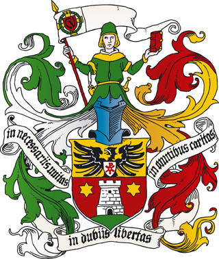 Beeldbeschrijving: Wapenschild van het Cartellverband der katholischen deutschen Studentenverbindungen Bron: Das Akademische Deutschland, Michael Doeberl u.a., Berlin 1931-1932, Bd. 4. Die Wappen der deutschen Korporationen des Inn- und Auslandes Fotograaf/tekenaar: ? Datum: 1932 Varia: ...